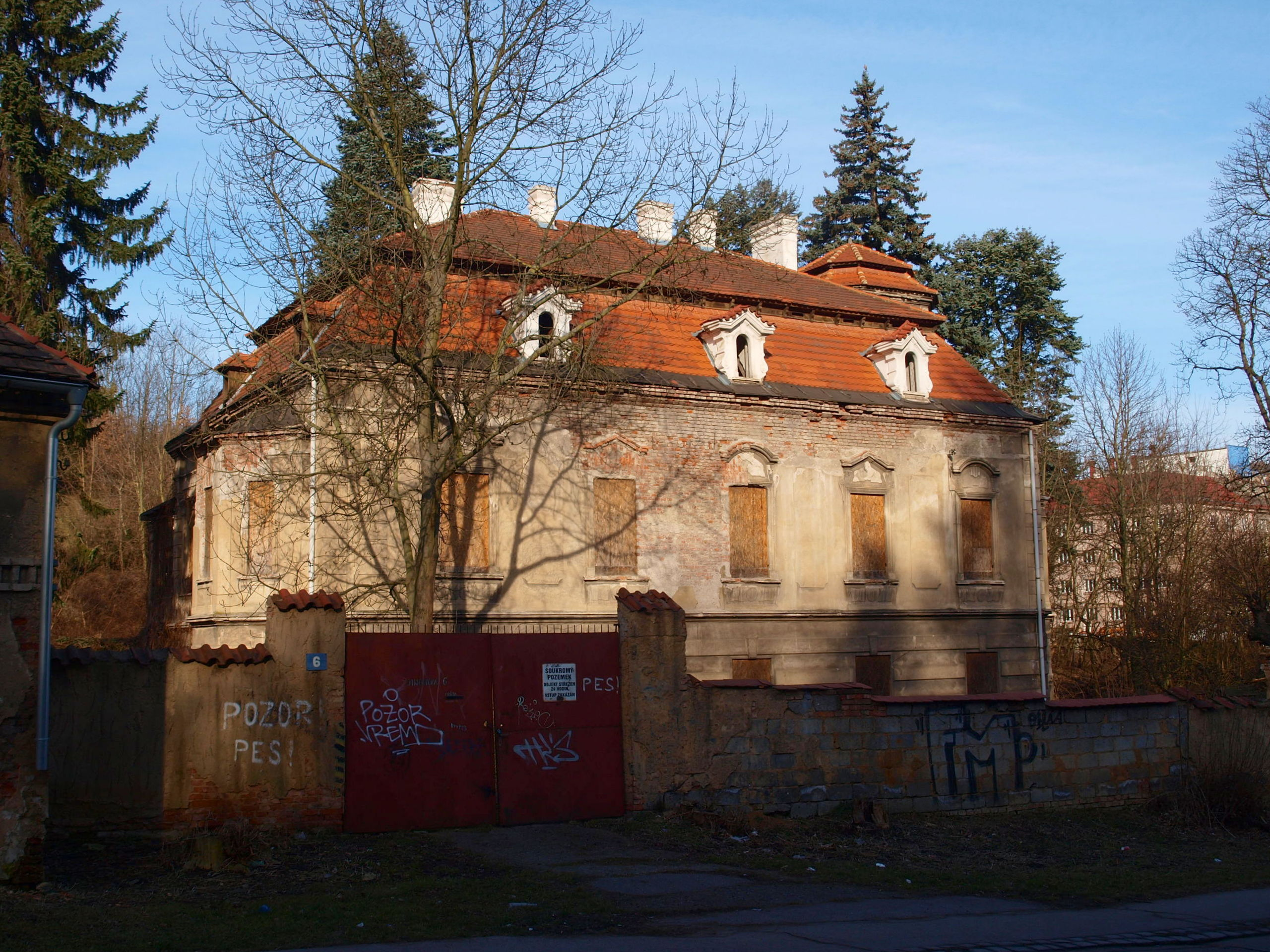 Usedlost Turbová